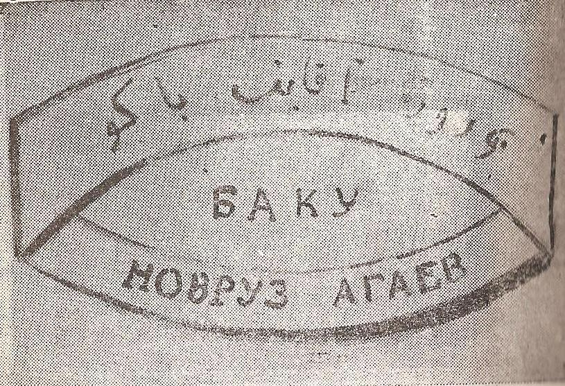 печать Новруза Aгаева (библиограф, библиофил и коллекционер рукописей Восточных писателей и поэтов). Изят из рукописи "Дивана" Саиб Тебризи